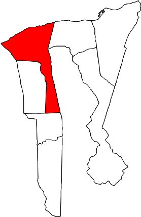 Ubicación de la parroquia Borojó en el municipio Buchivacoa, estado Falcón, Venezuela